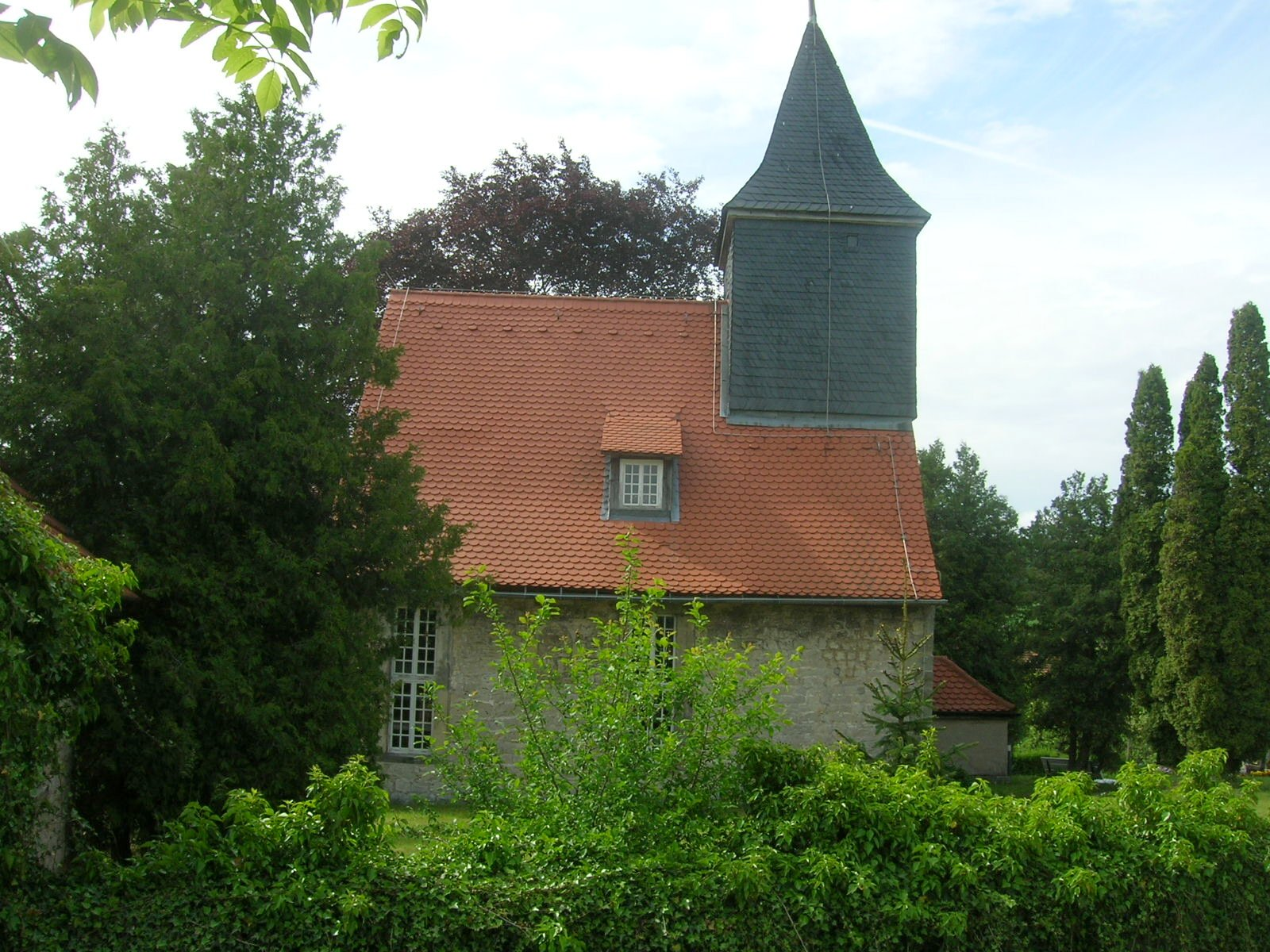 Branchewinda im Ilm-Kreis, Dorfkirche